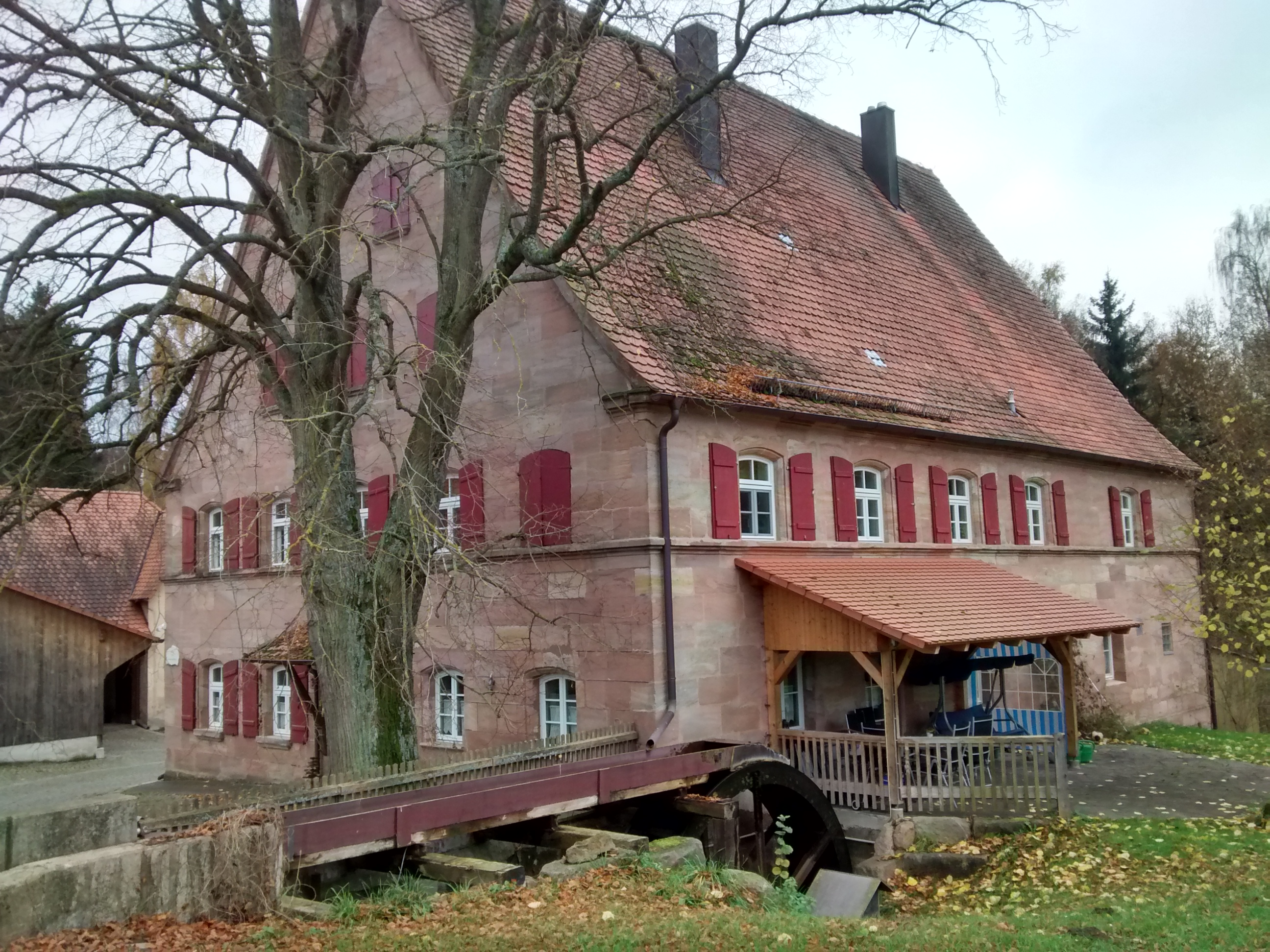 Weihersmühle